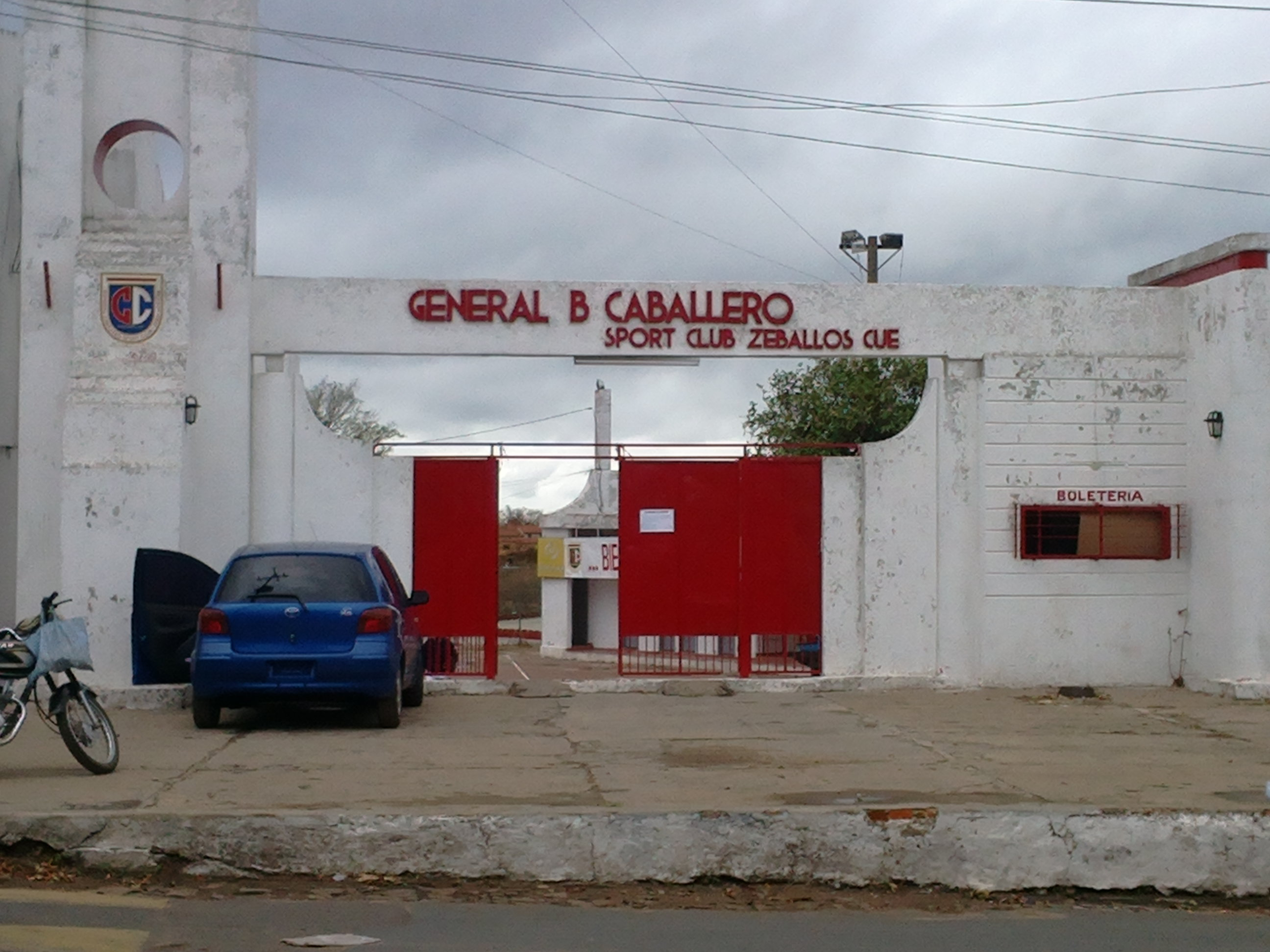 Fachada del Estadio Hugo Bogado Vaceque, Zeballos Cué, Asunción, Paraguay